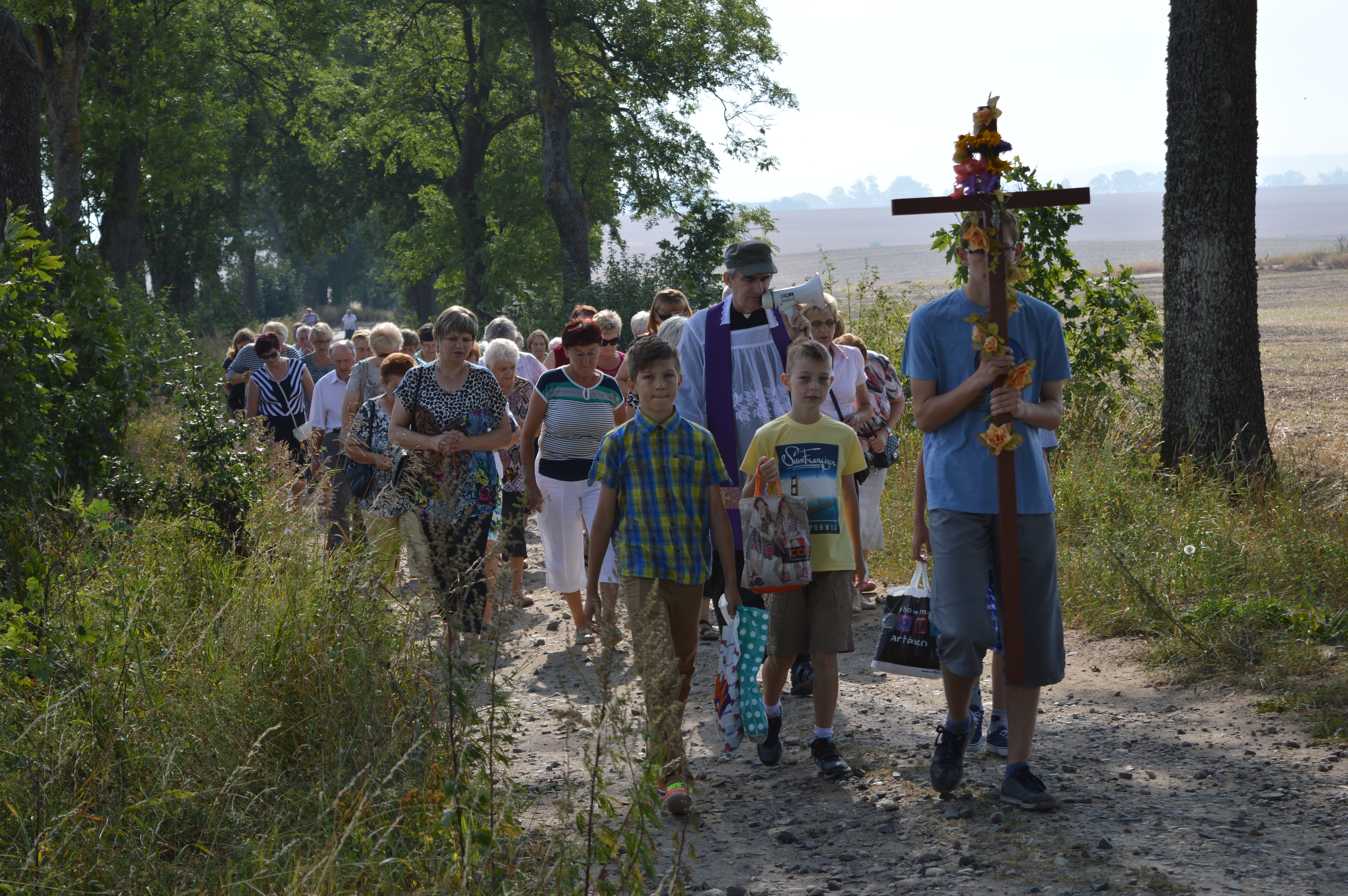 Pielgrzymka z Sątop-Samulewa do Nowej Wsi Reszelskiej